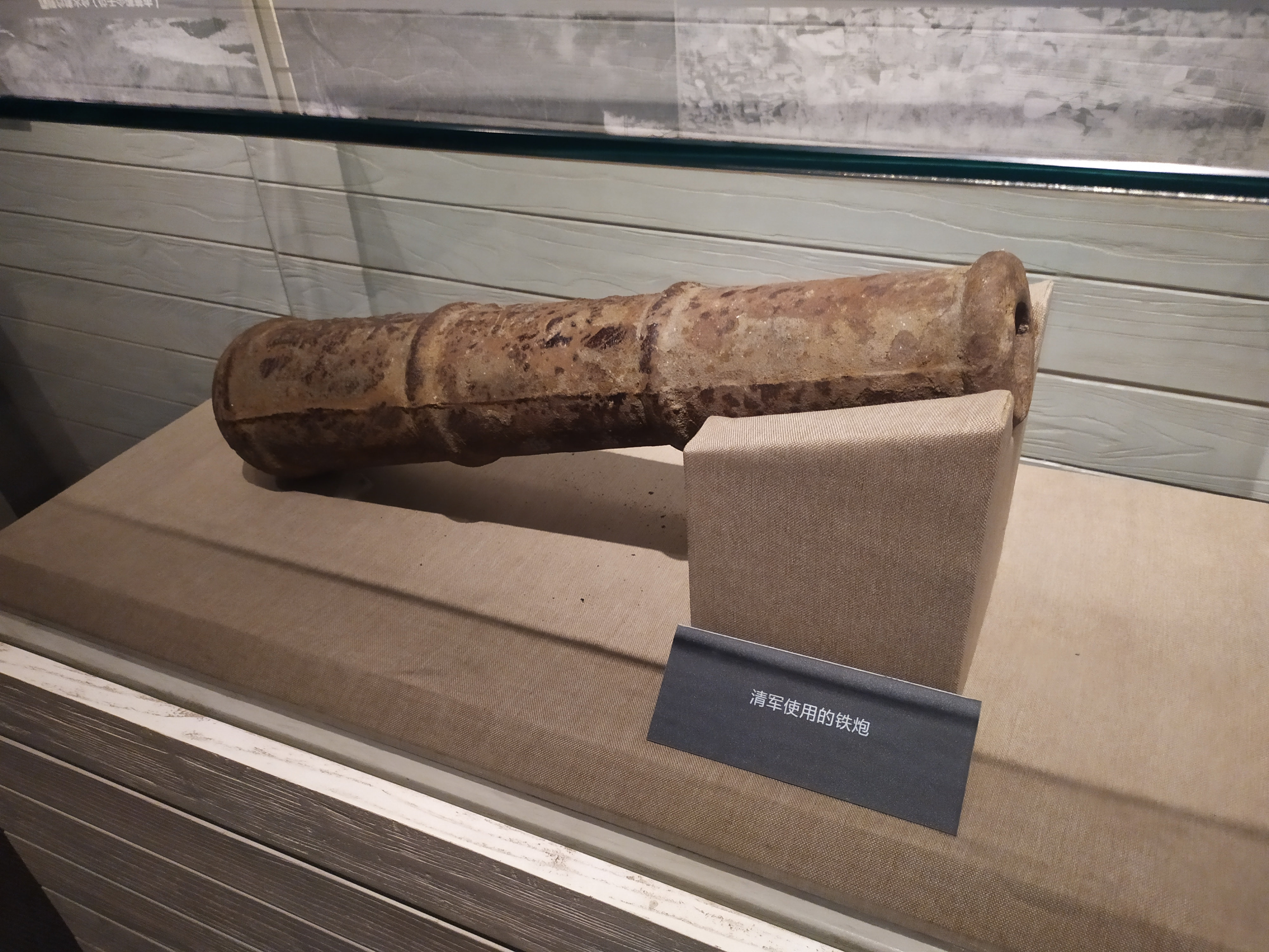 中文（中国大陆）: 拍摄于美国领事馆